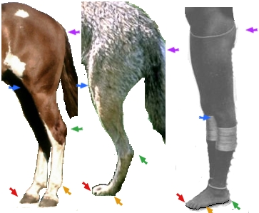 Zehenspitzengänger (Pferd), Zehengänger (Wolf) und Sohlengänger (Mensch) im Vergleich